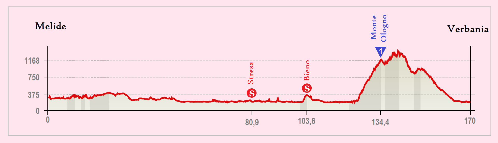 Perfil de la 18.º etapa del Giro de Italia 2015